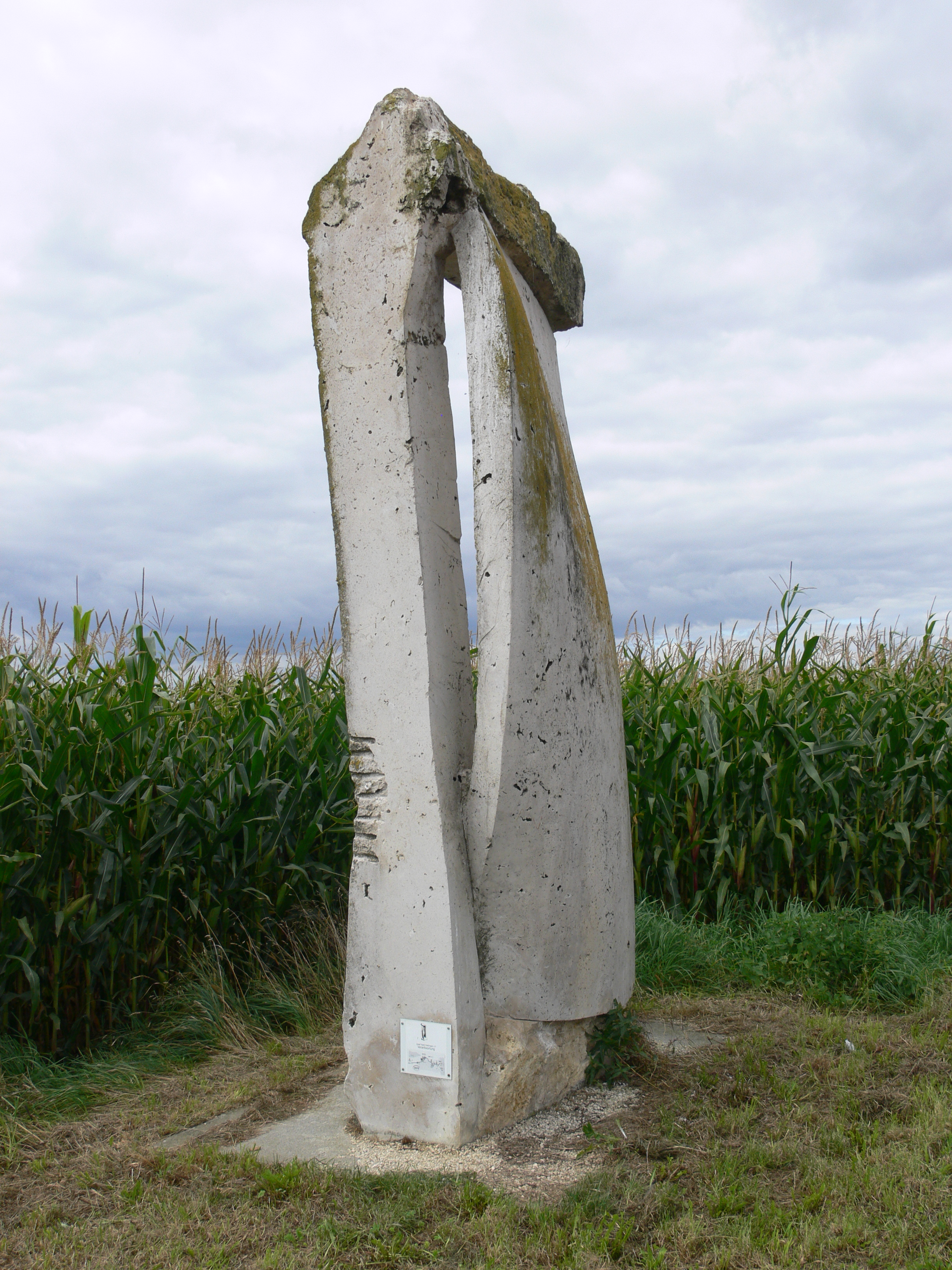 Skulpturenfeld Oggelshausen, Landkreis Biberach Europäisches Bildhauersymposium 2000 Josef Nadj: Verantwortung